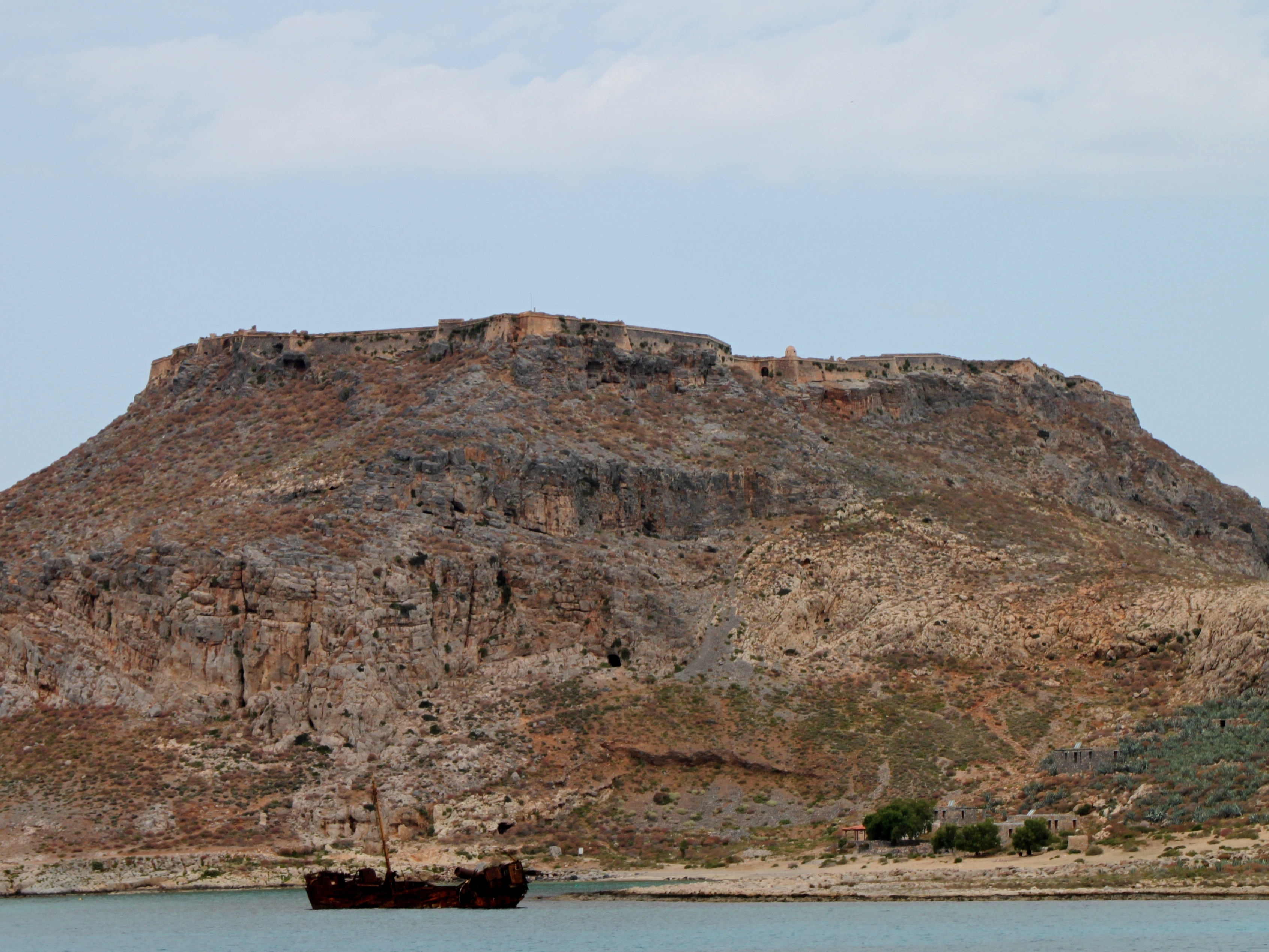 Festungsruine Kastro Gramvousas (Κάστρο Γραμβούσας) auf Imeri Gramvousa (Ήμερη Γραμβούσα), Insel in der Gemeinde Kissamos, Präfektur Chania, Kreta, Griechenland